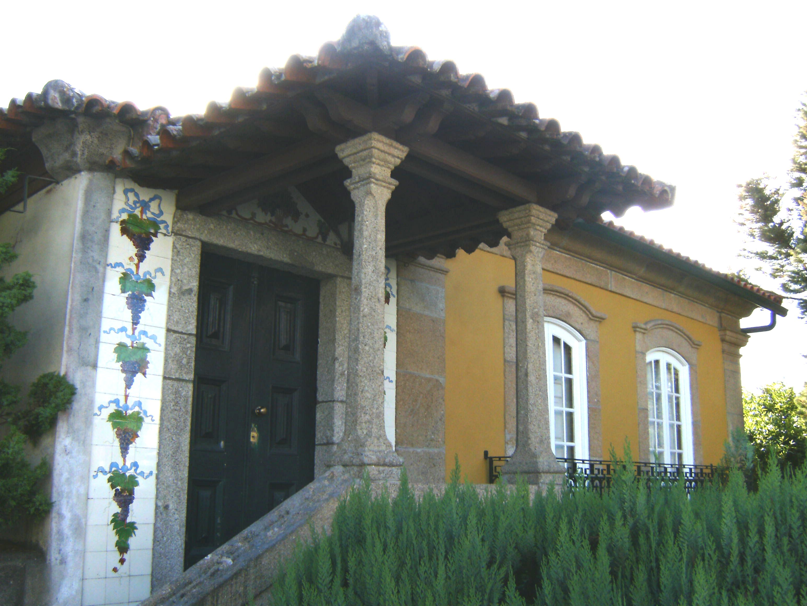 Entrada principal da Quinta das Uveiras, em Paços de Ferreira